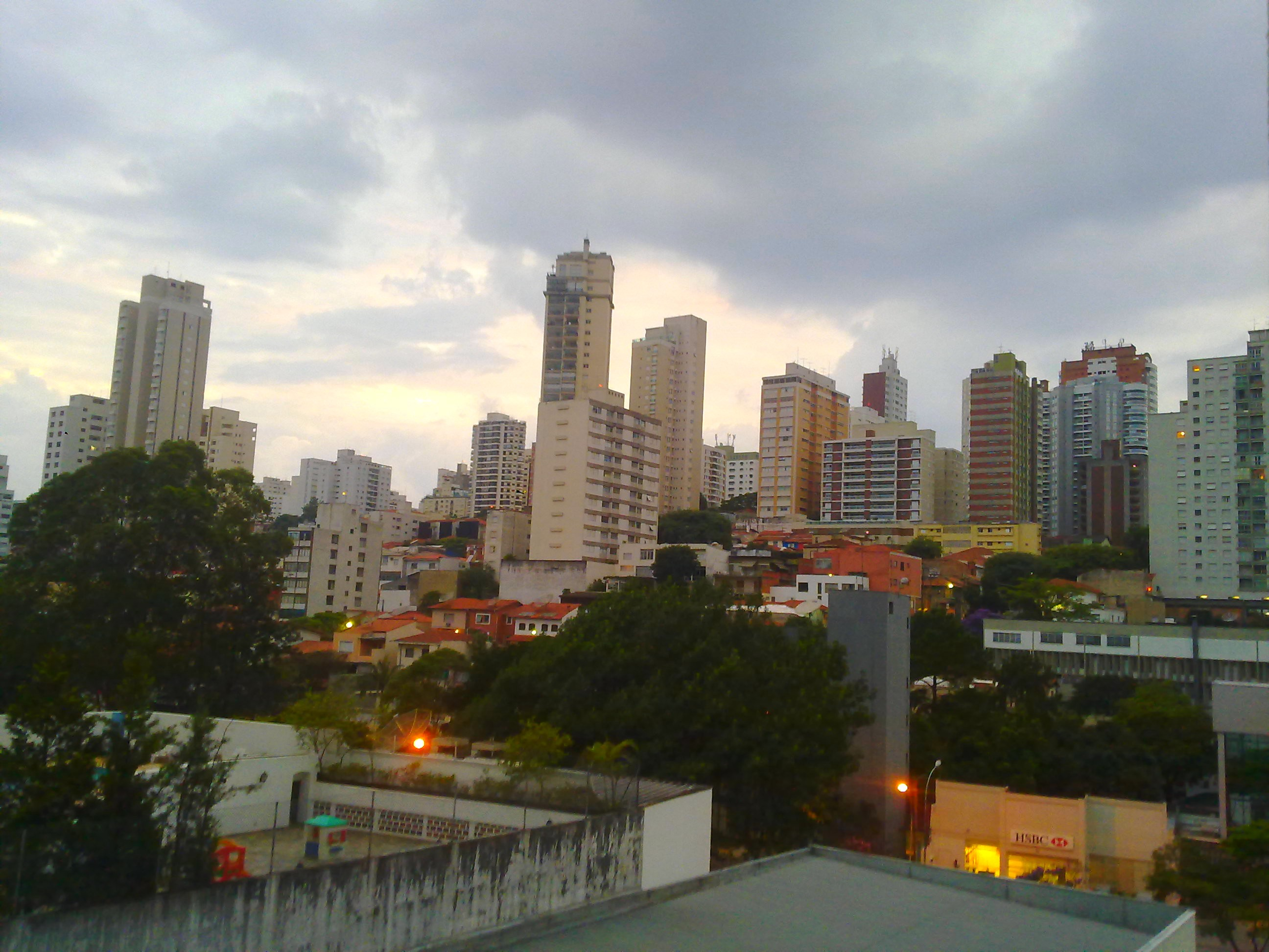 Foto do distrito de Perdizes, Zona Oeste de São Paulo, Brasil.